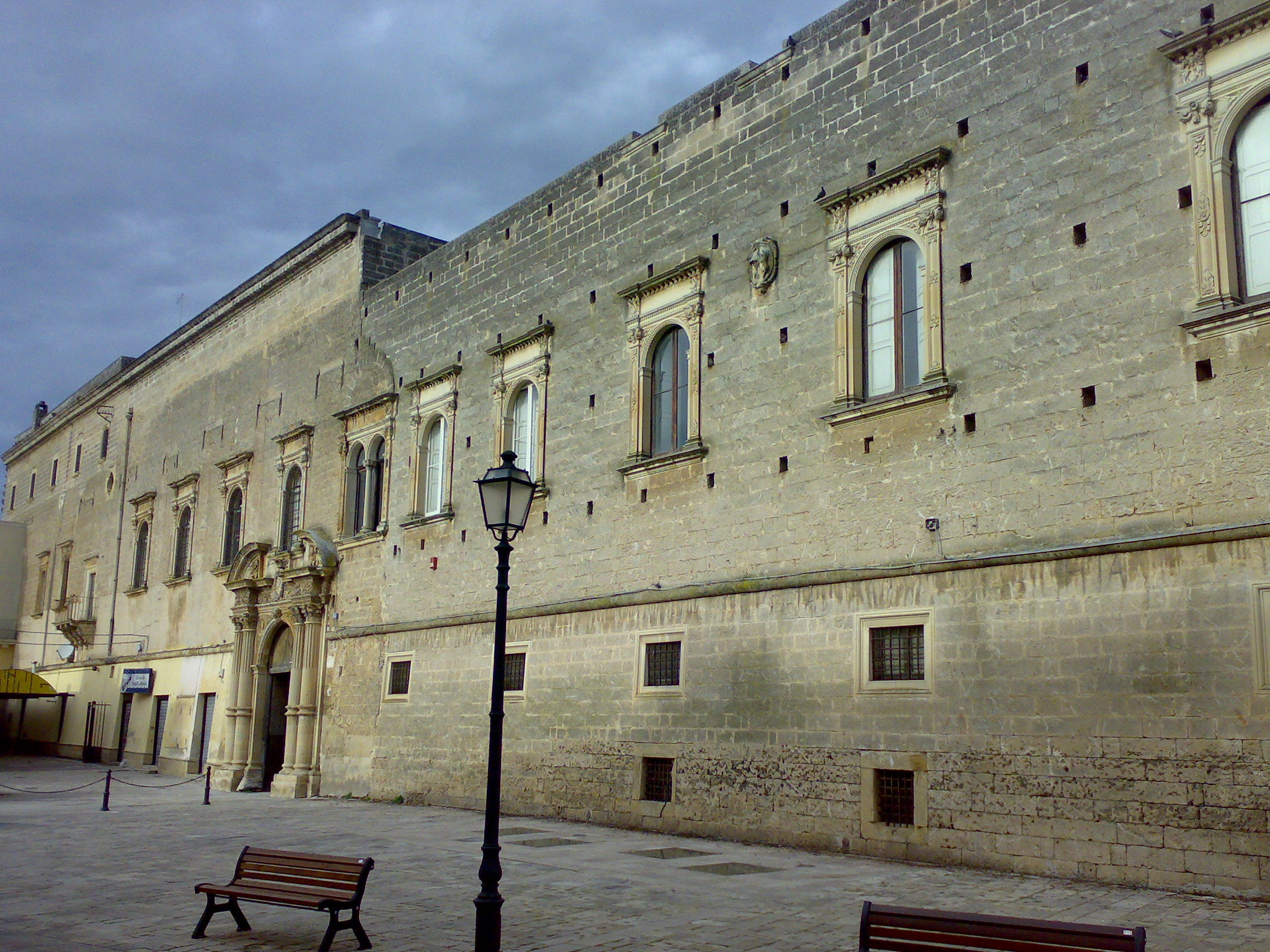 Palazzo Marchesale Monteroni di Lecce